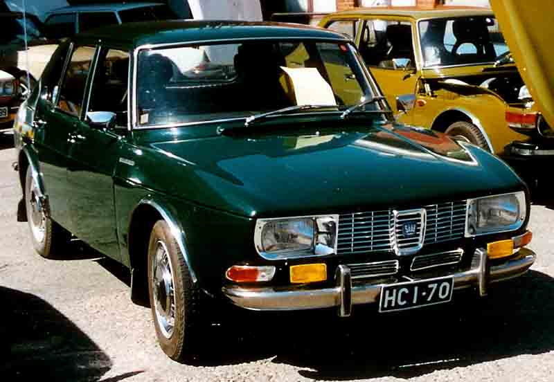 SAAB 99 4-Door Sedan